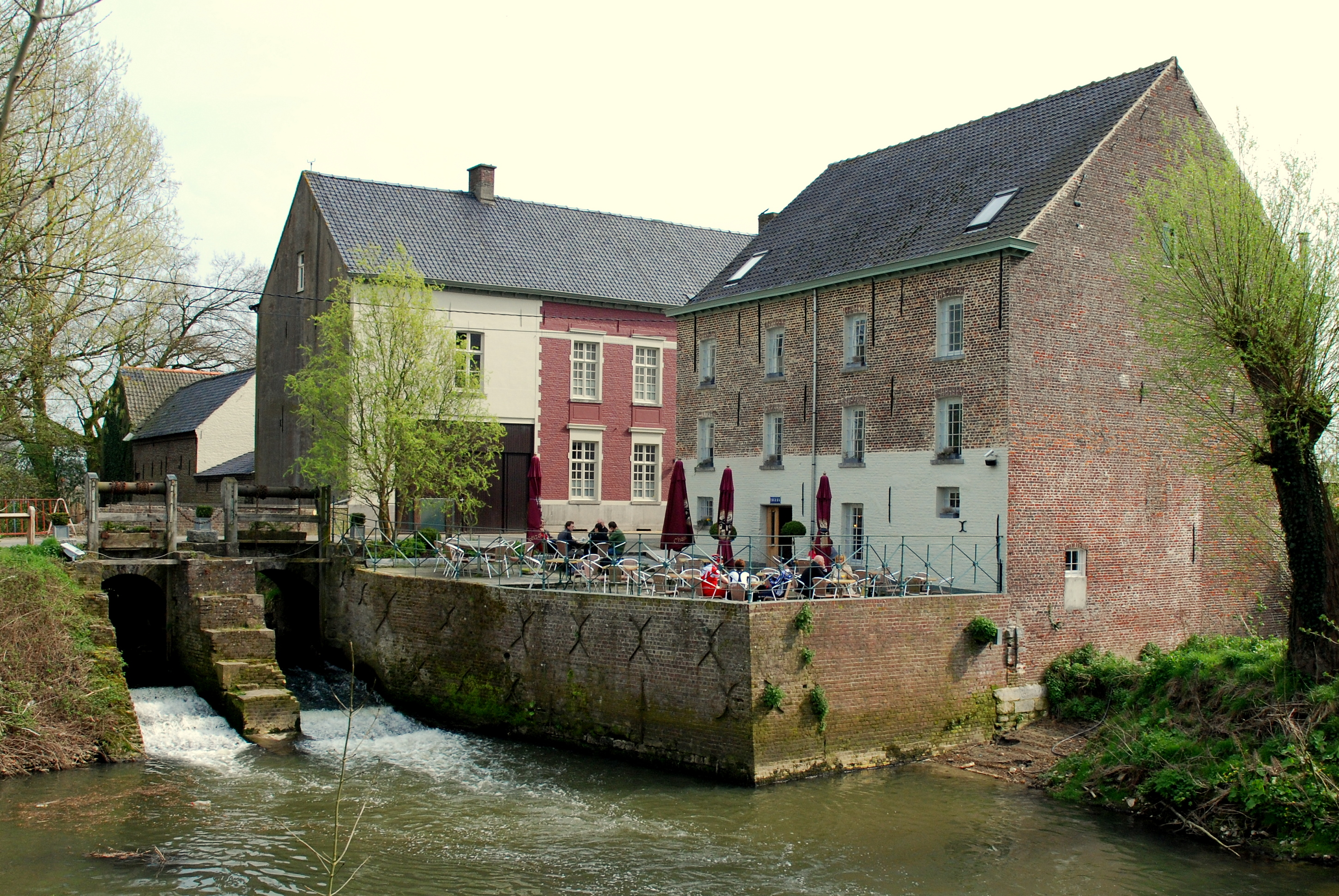 de Ter Biestmolen in Zwalm in de gemeente Zwalm, België